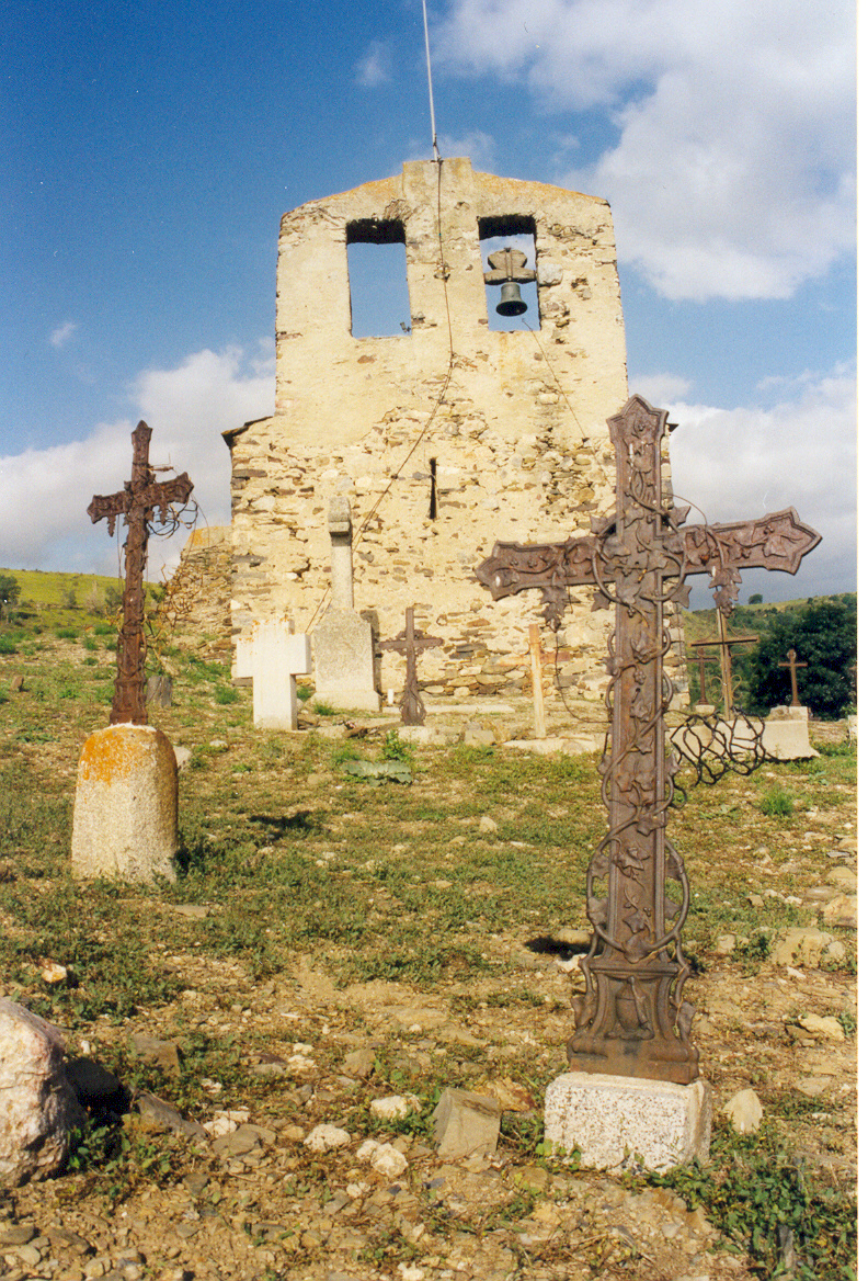 Saint BarthÃ©lÃ©my de Bajande